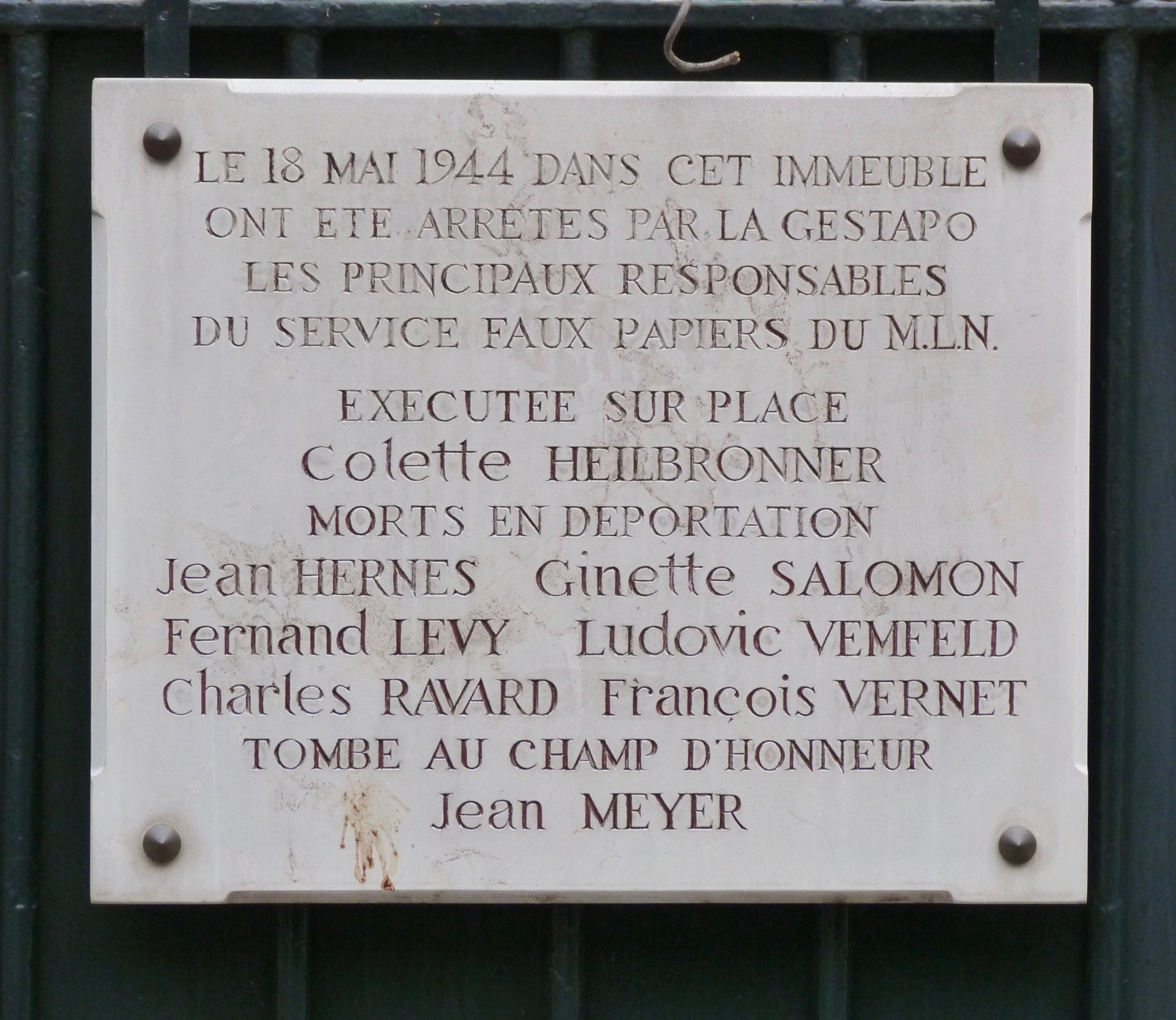 Cité des Fleurs, voie privée, Paris (17e arrond.), Plaque commémorative sur la grille de la maison au n°25, fait de résistance.